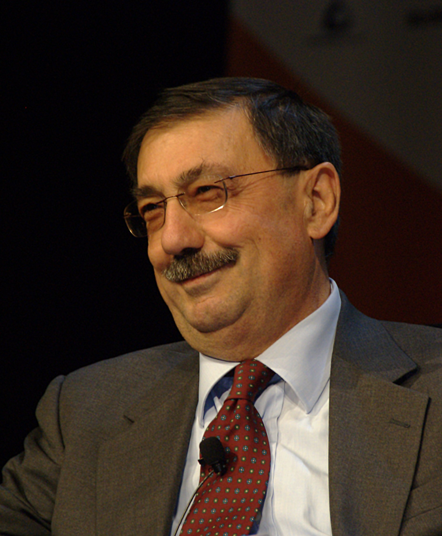 Fabio Mussi al Teatro Sociale di Trento per il Festival dell'Economia 2007